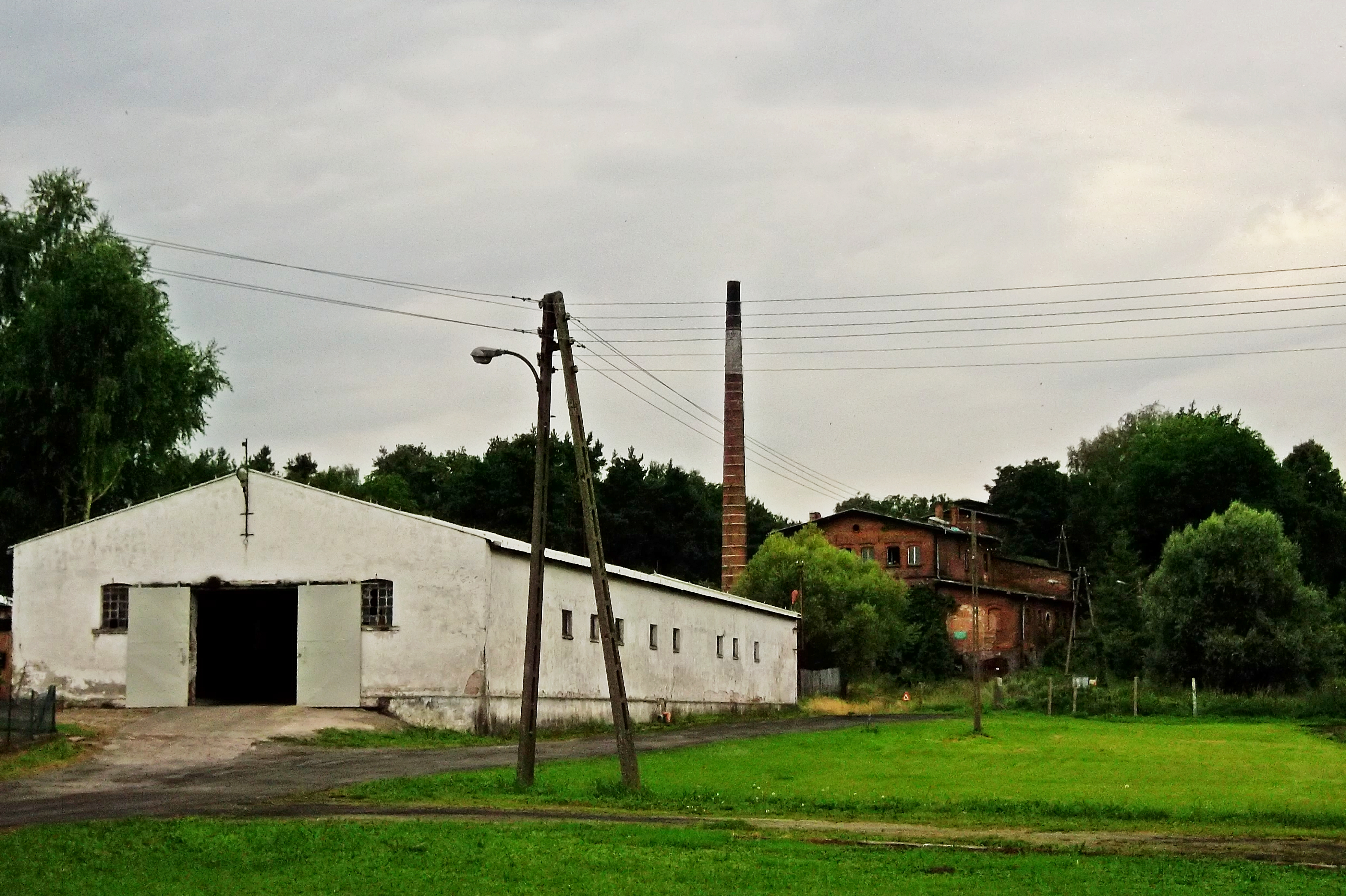 Rożnowo - zabudowania gospodarcze